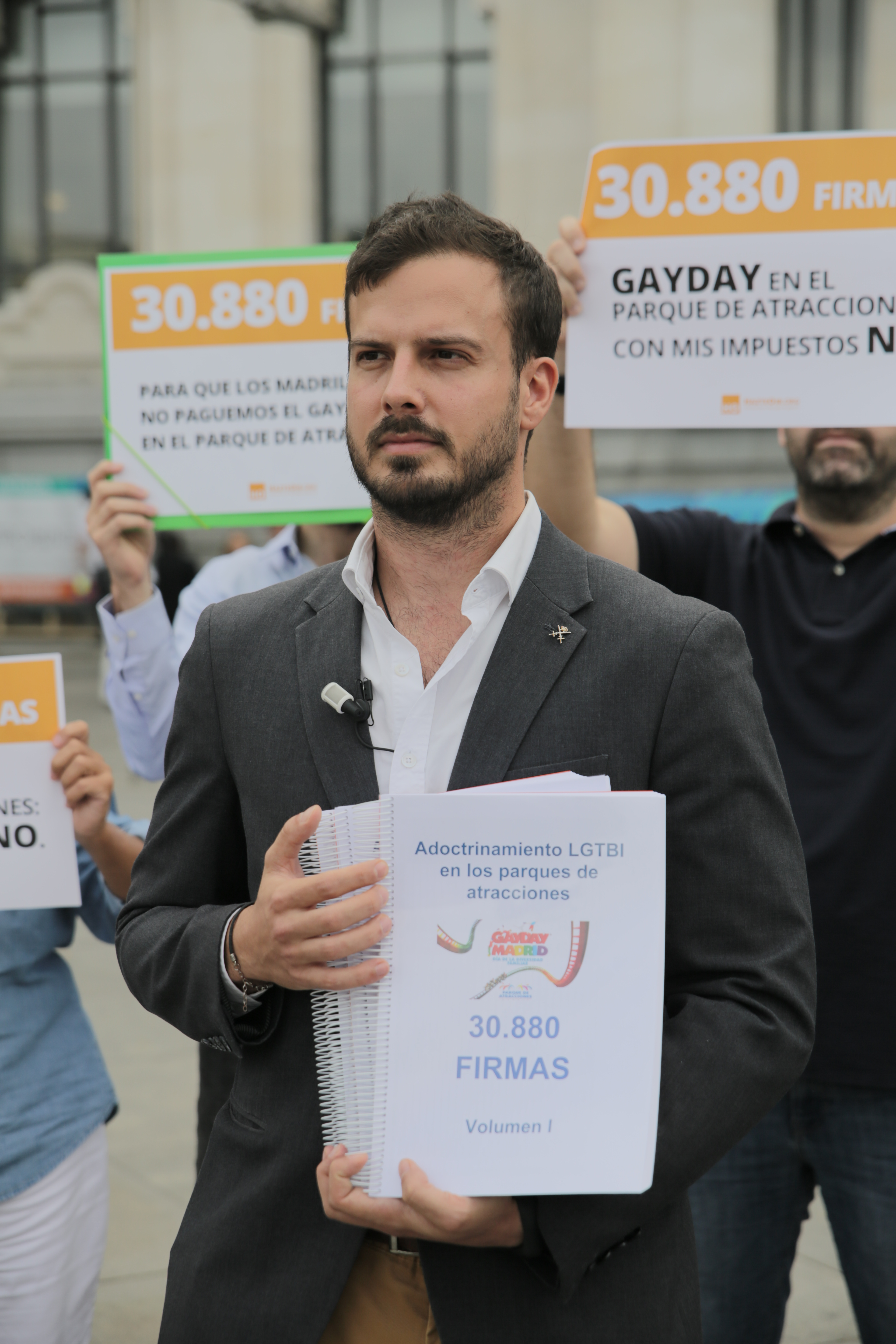 20.09.2019 Entrega de Firmas en el Ayto. de Madrid. Adoctrinamiento LGTBI en el parque de atracciones en Madrid